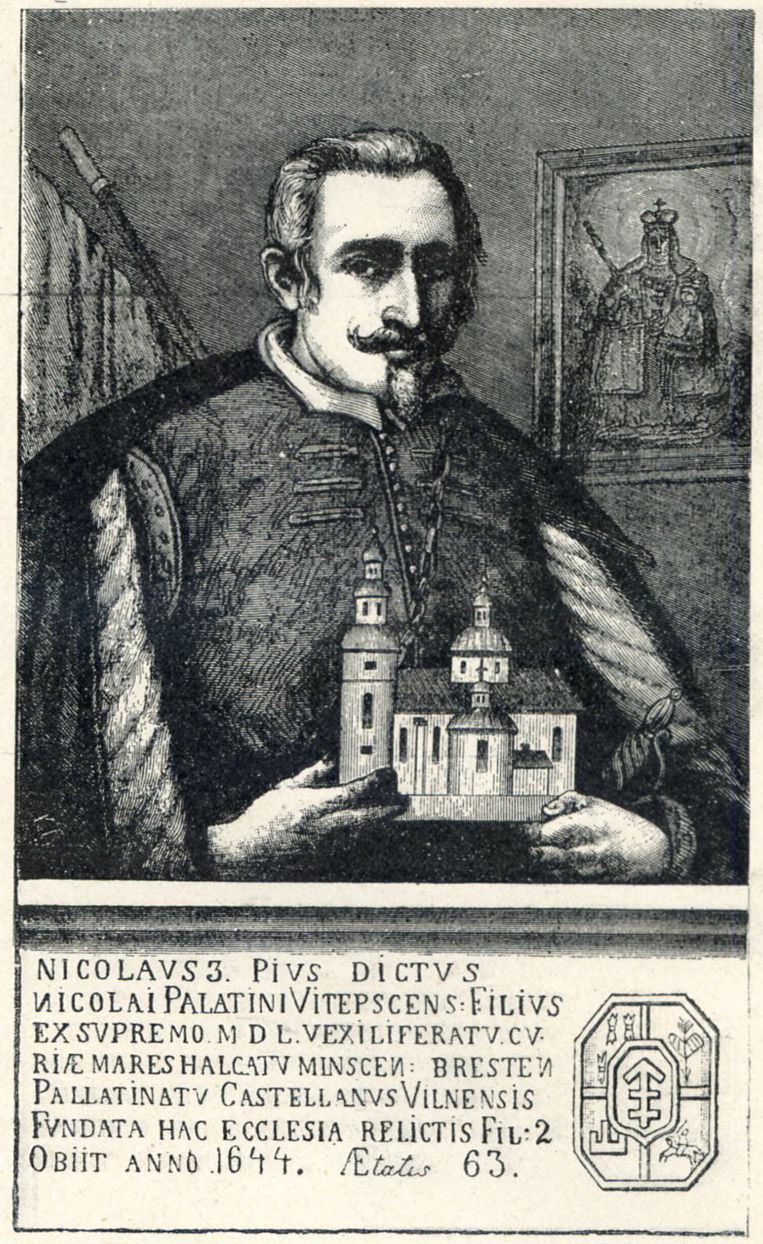 Беларуская (тарашкевіца): Партрэт Мікалая Сапегі «Пабожнага» (Mikałaj Sapieha «Pabožny») гербу «Ліс» (1581—1644), ваяводы берасьцейскага і менскага